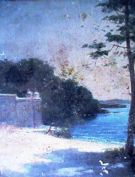 Huile sur panneau de bois. Coll. part.